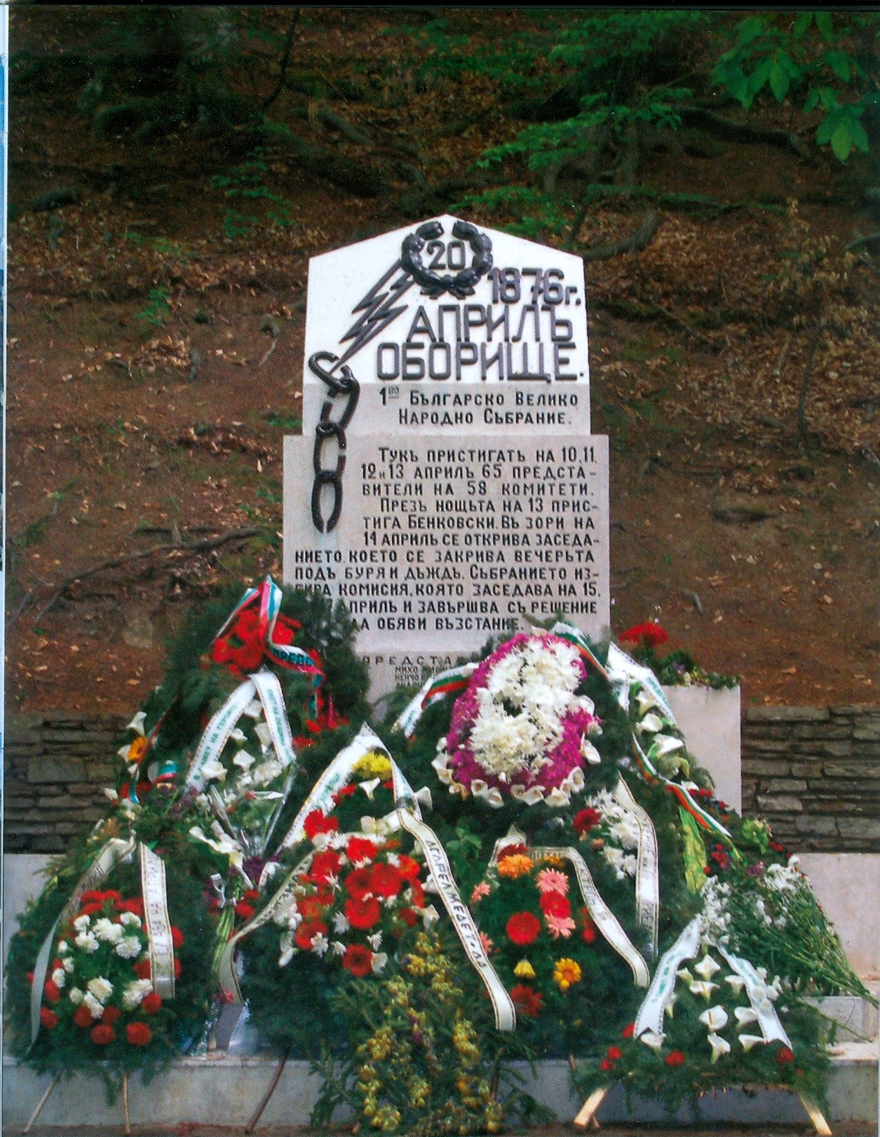 Паметникът в местността "Оборище"